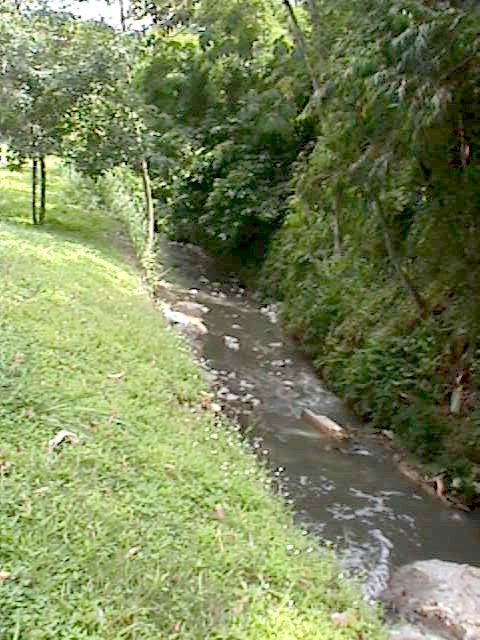 Lecho de la quebrada La Boyera a nivel CMDLT